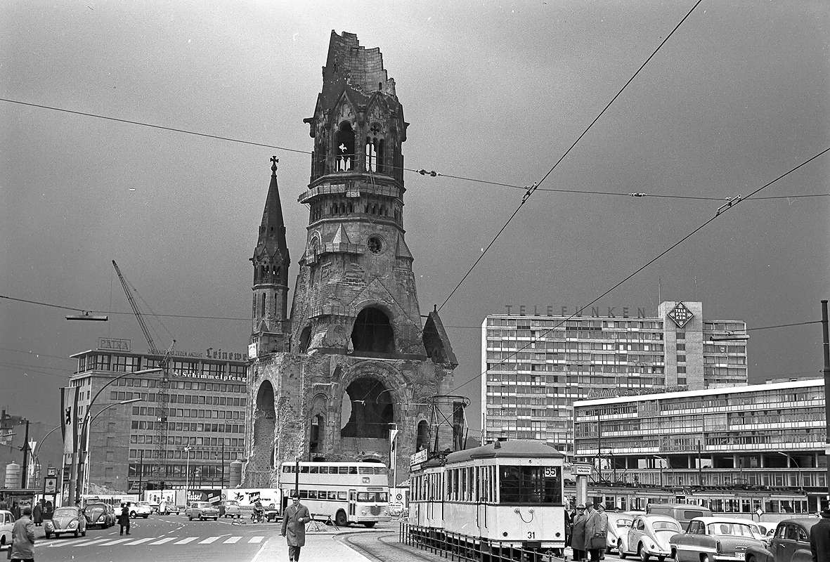 Blick von der Tauentzienstraße auf die Kaiser-Wilhelm-Gedächtniskirche in Berlin-Charlottenburg.